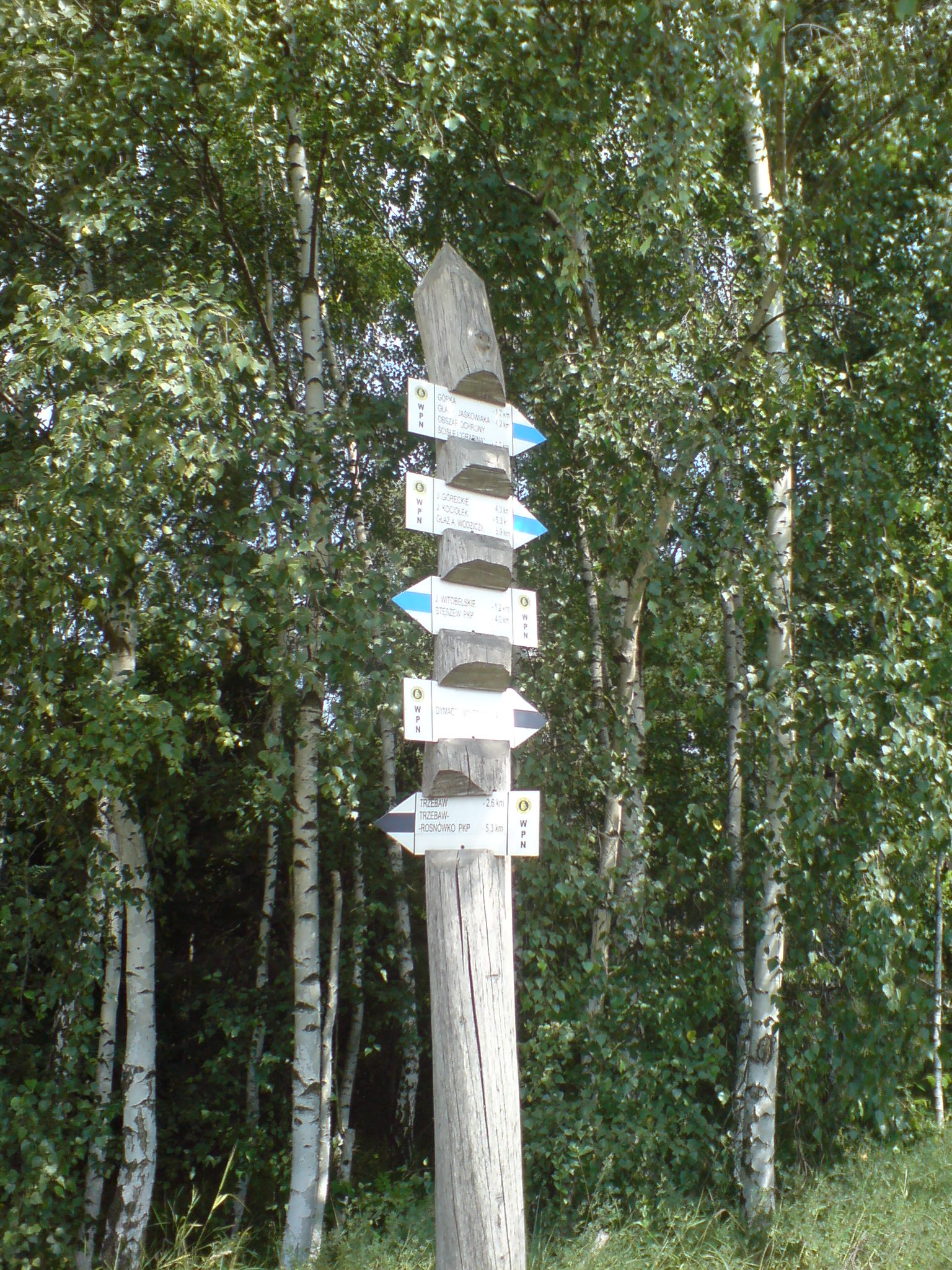 oznakowanie szlaków